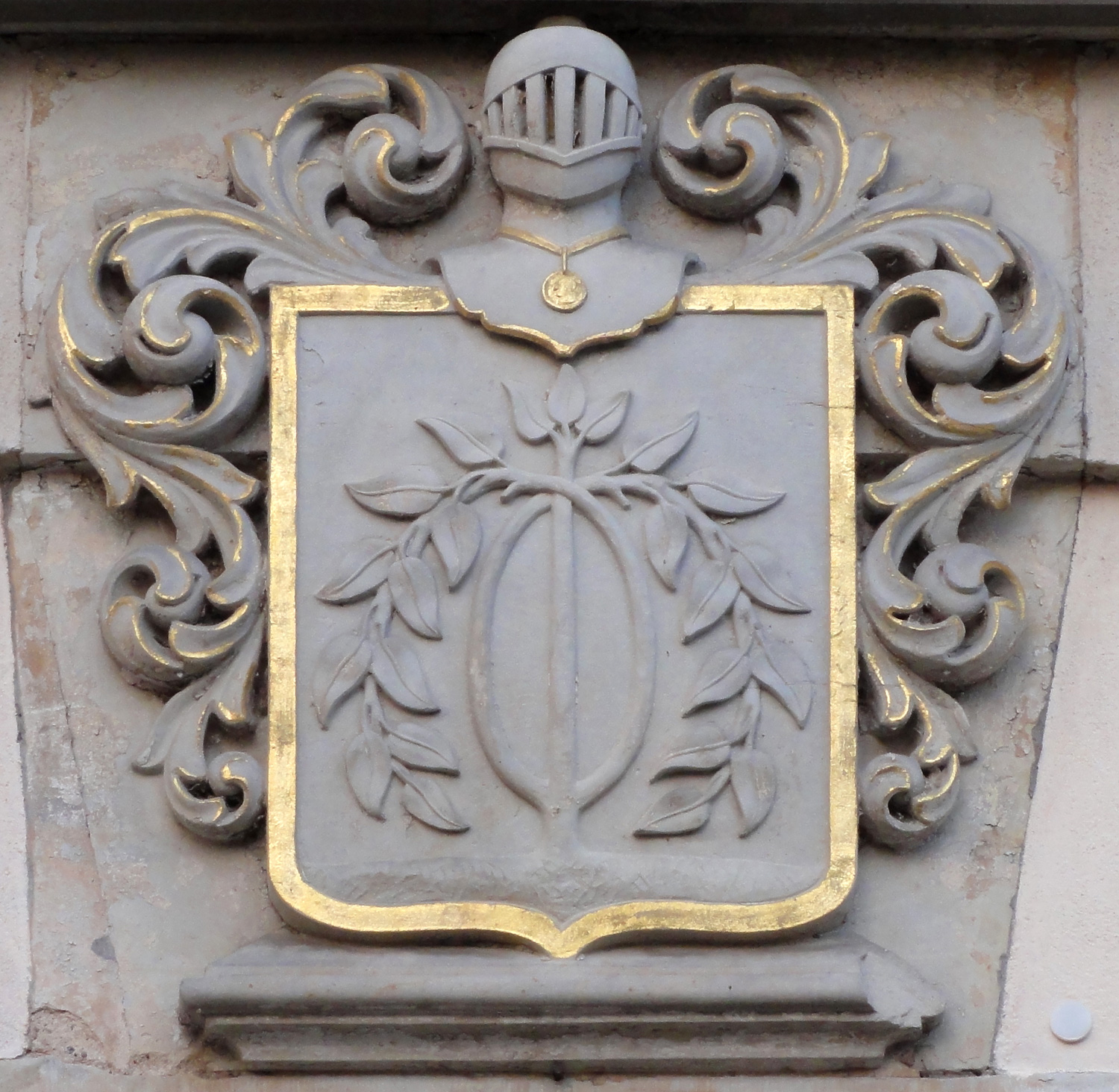 Egestorff-Stiftung in Bremen: Gutshaus (um 1755), Wappen Oelrichs über dem südlichen Haupteingang Das abgebildete Objekt ist ein geschütztes Kulturdenkmal in der Freien Hansestadt Bremen, mit der Nr. 1724 beim Landesamt für Denkmalpflege registriert.